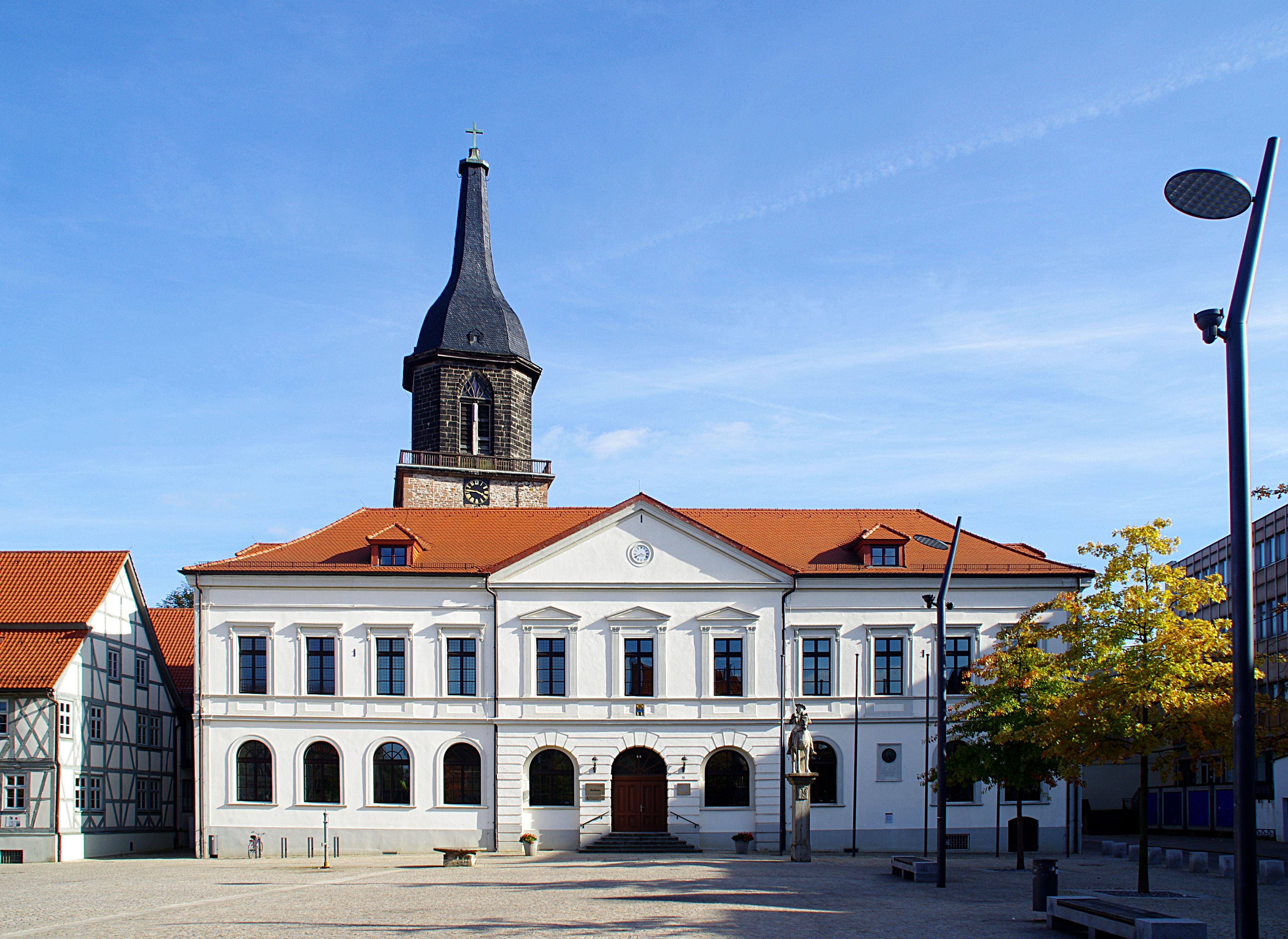 Haldensleben in Sachsen-Anhalt. Das Rathaus vom Markt aus. links vor dem Rathaus befindet sich der reitende Roland, rechts ein Gerichtstisch. Im Hintergrund die Marienkirche.